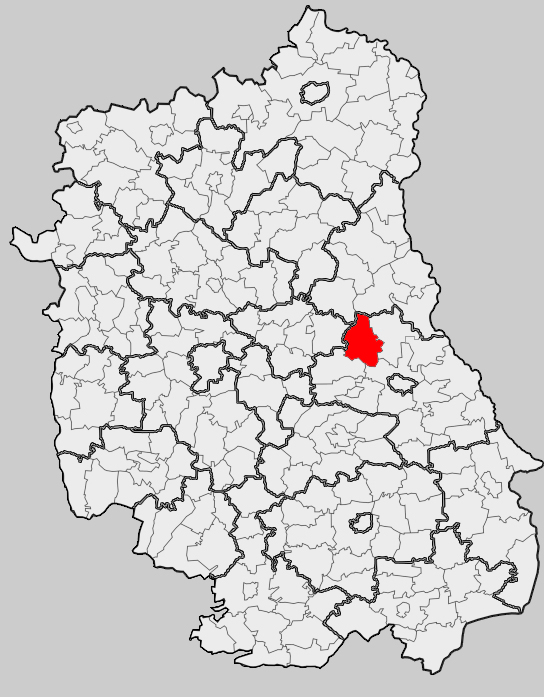 Map of gmina Wierzbica, Chełm county, Lublin voivodship Mapa gminy Wierzbica, powiat chełmski, województwo lubelskie